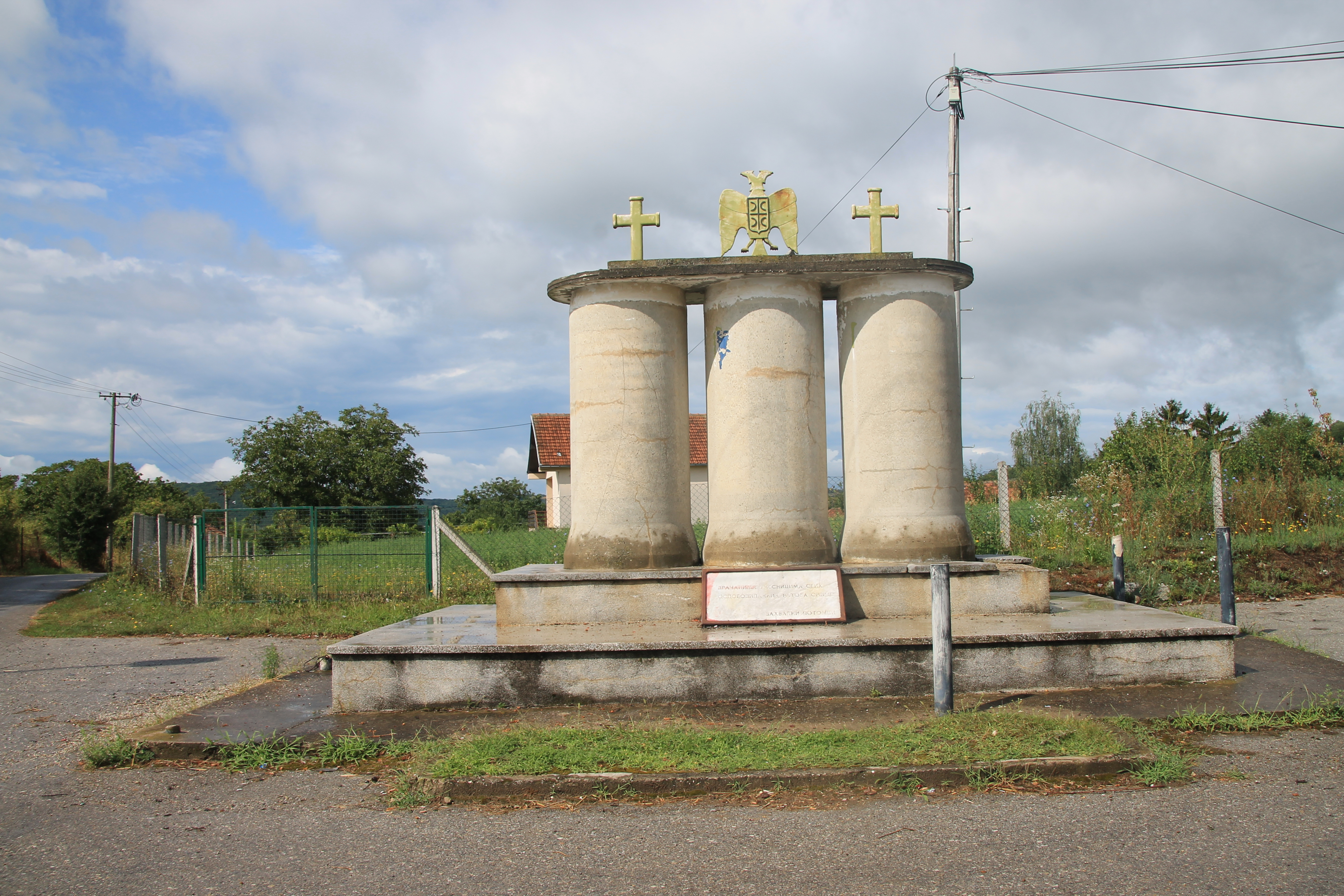 Drača